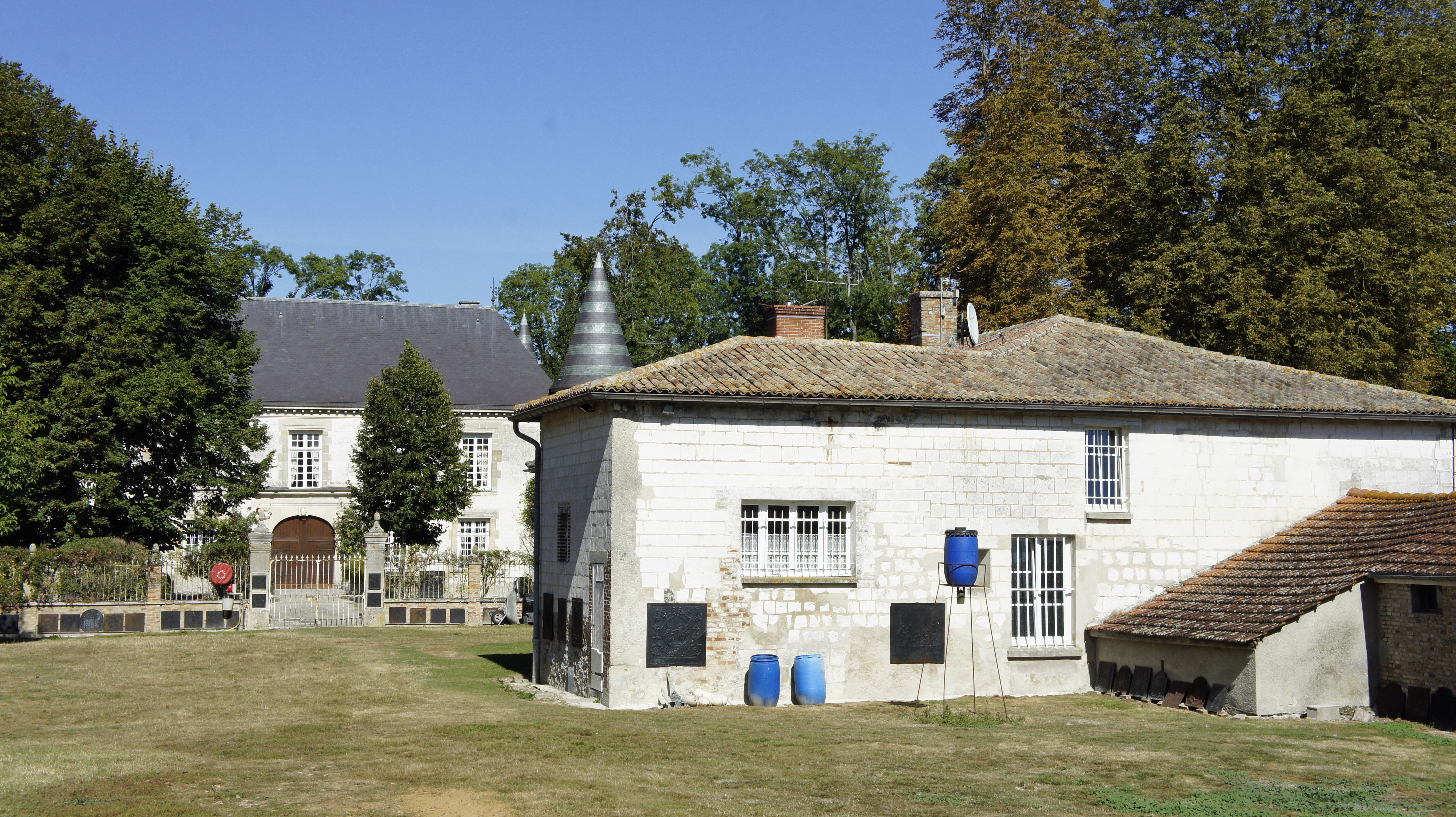 Bâtiment principal du château.